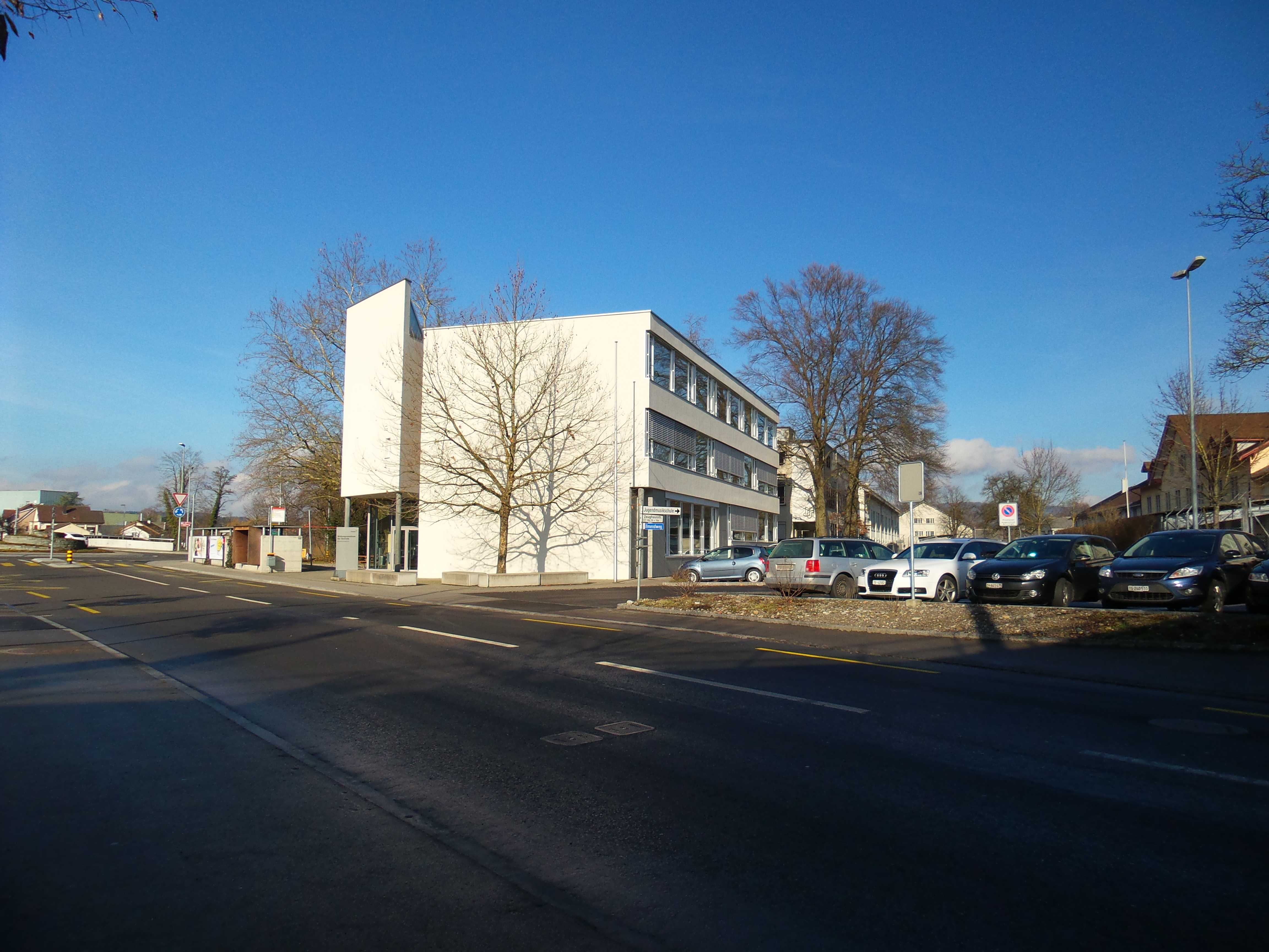 Brückenangebot Frauenfeld.